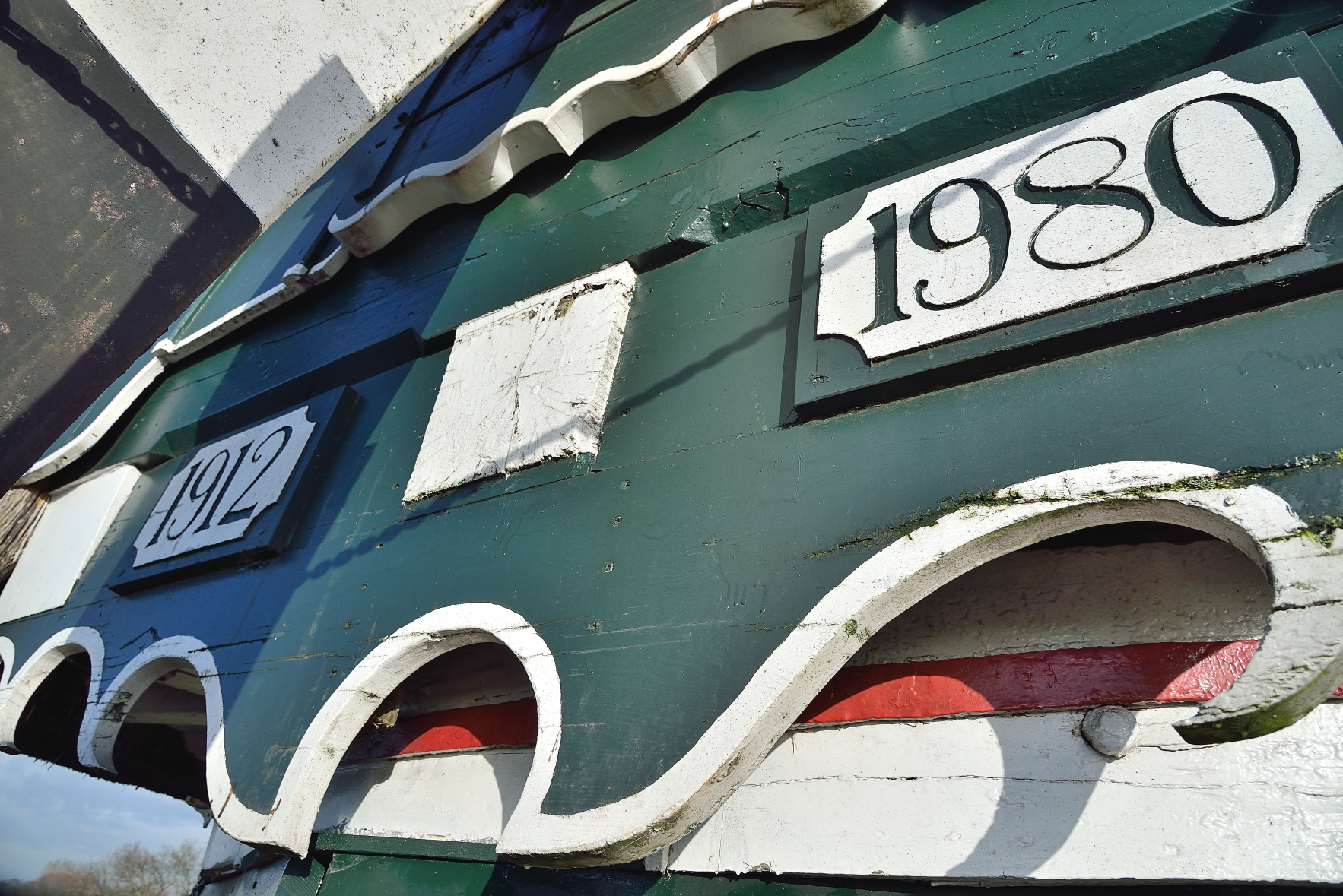 Baard